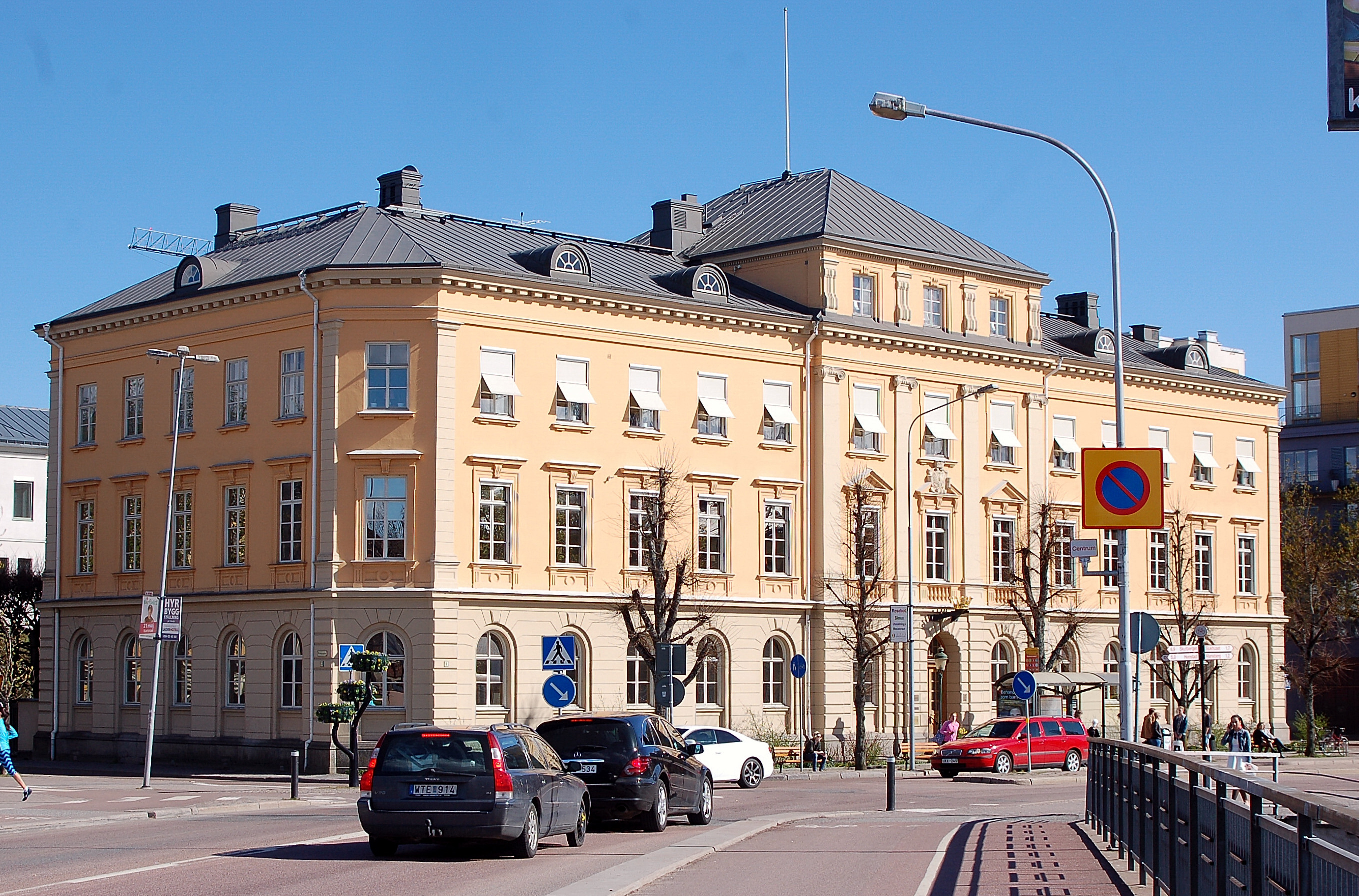 Residenset i Karlstad. Byggår 1869-71. Arkitekt: Johan Fredrik Åbom. Ombyggt 1921-23, arkitekt Bror Almqvist.